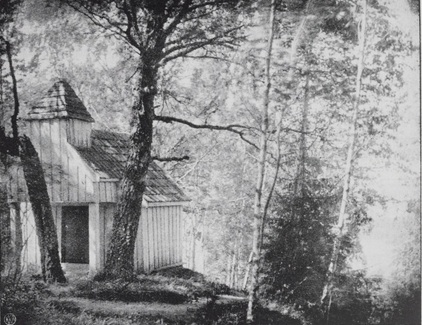 Bechs kapell ved gården Håkås (Haagaas) søndre i Båstad i Trøgstad kommune